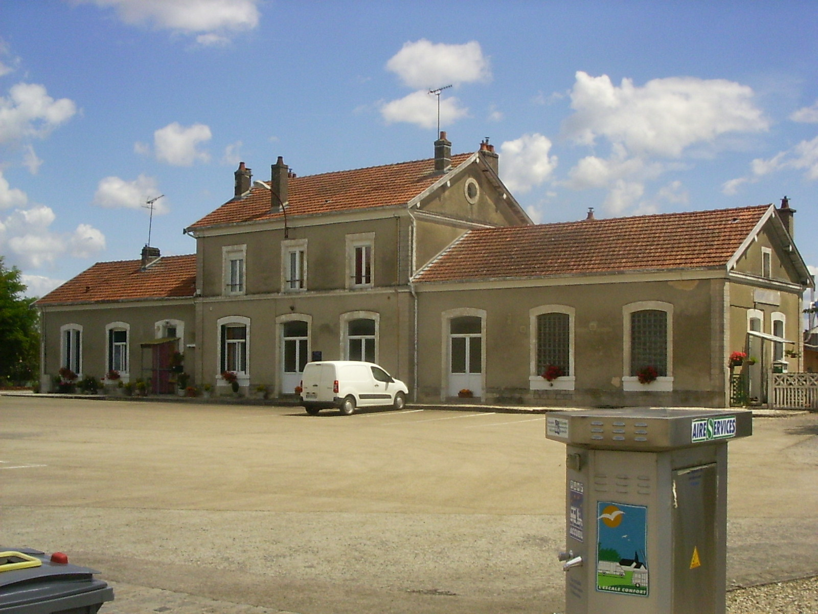 Brienne-le-château, station, straatzijde